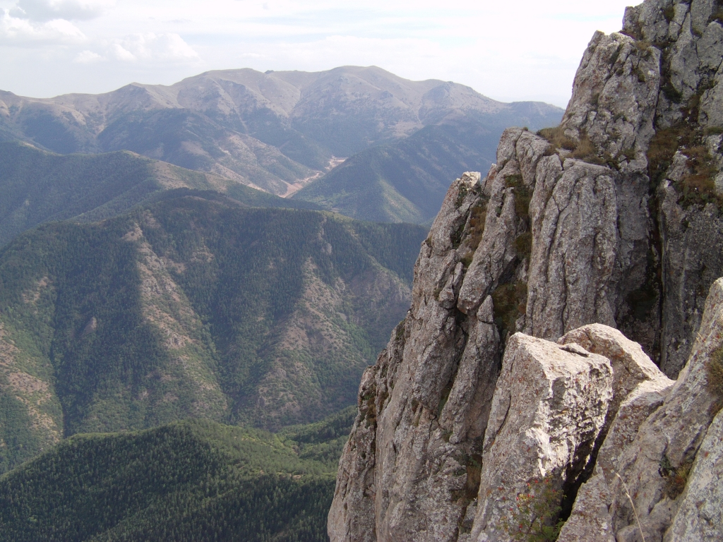 Ecel Taşı...